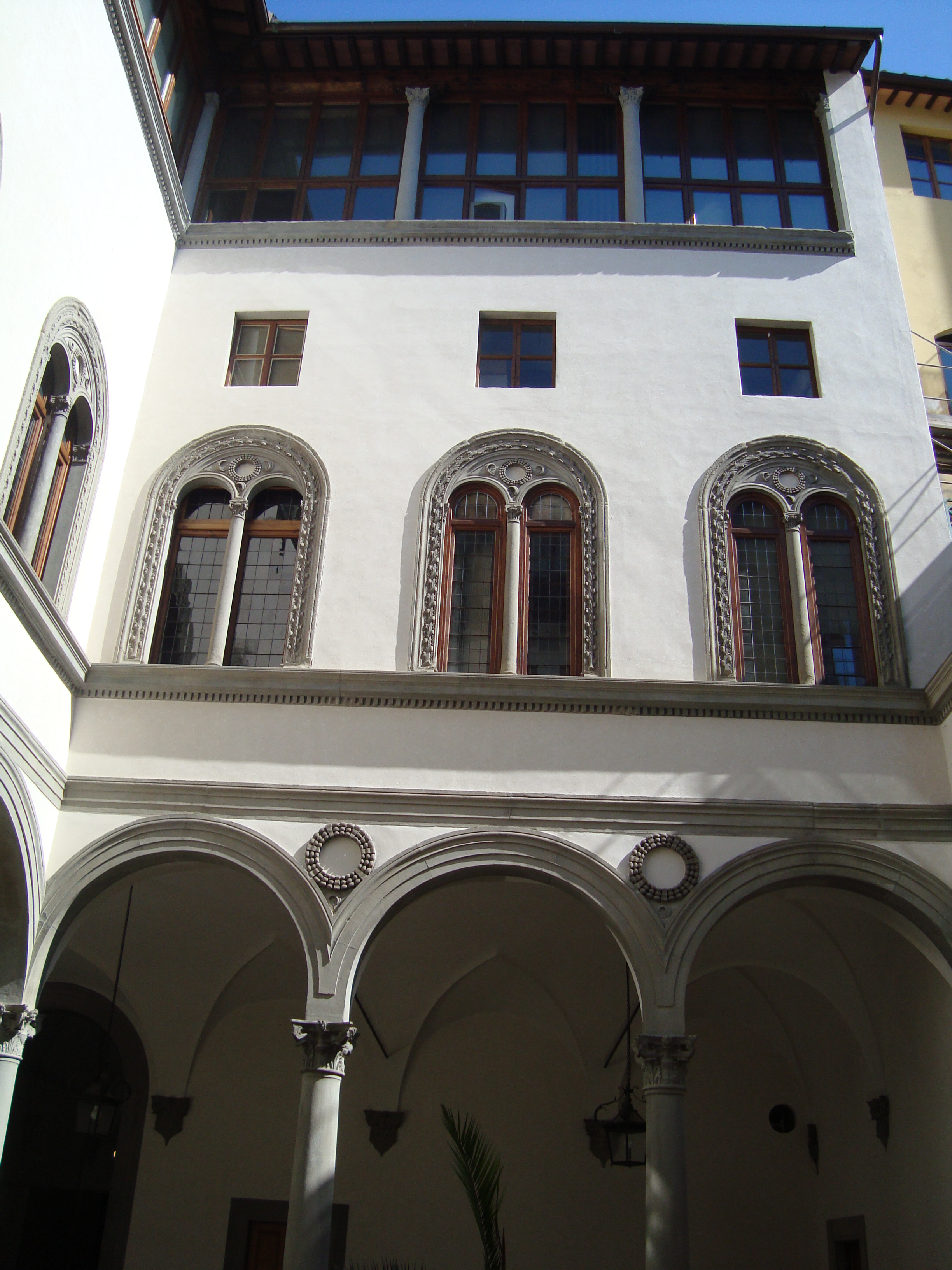 Palazzo pazzi, cortile 6